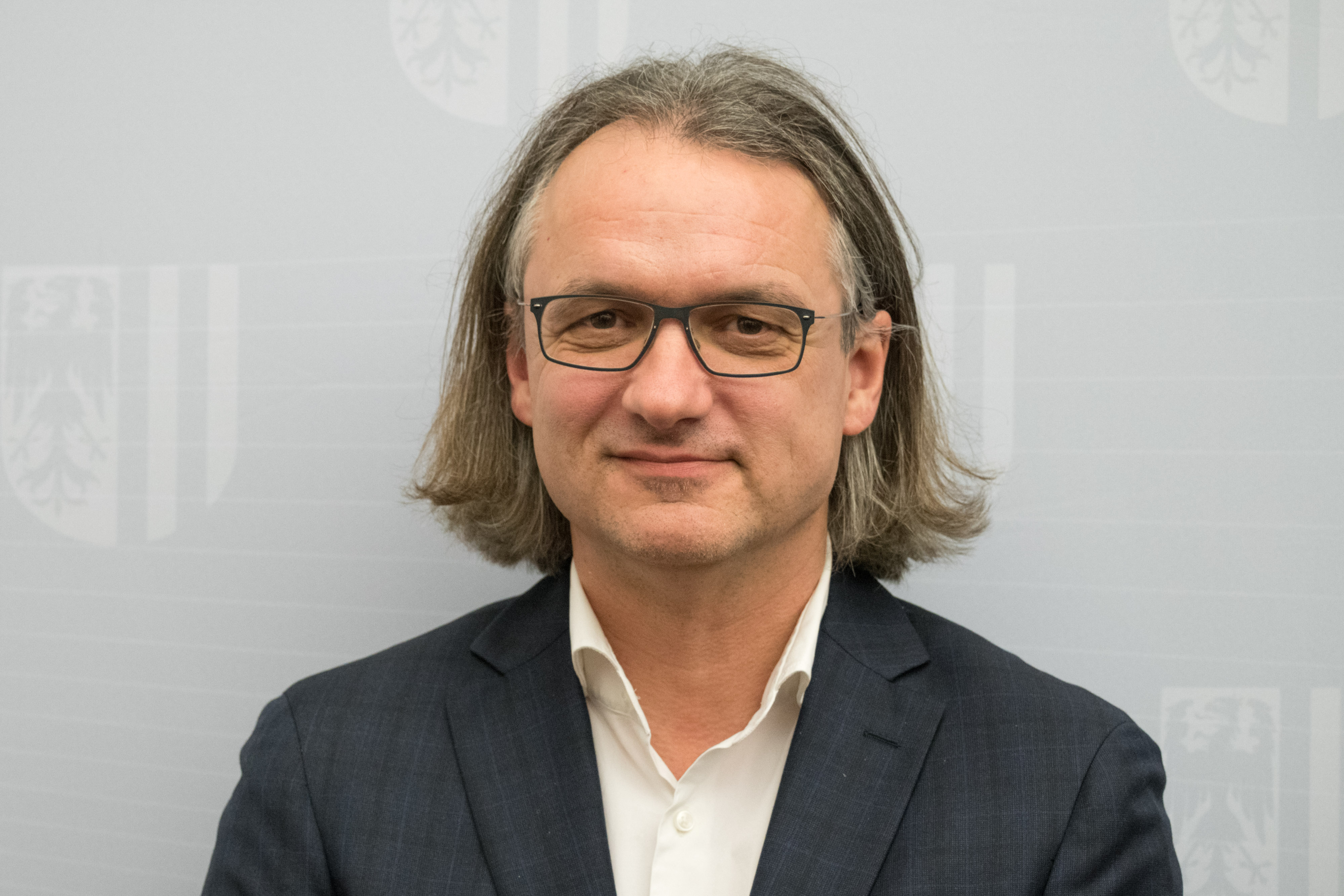 Julius Stieber, Kulturdirektor der Stadt Linz